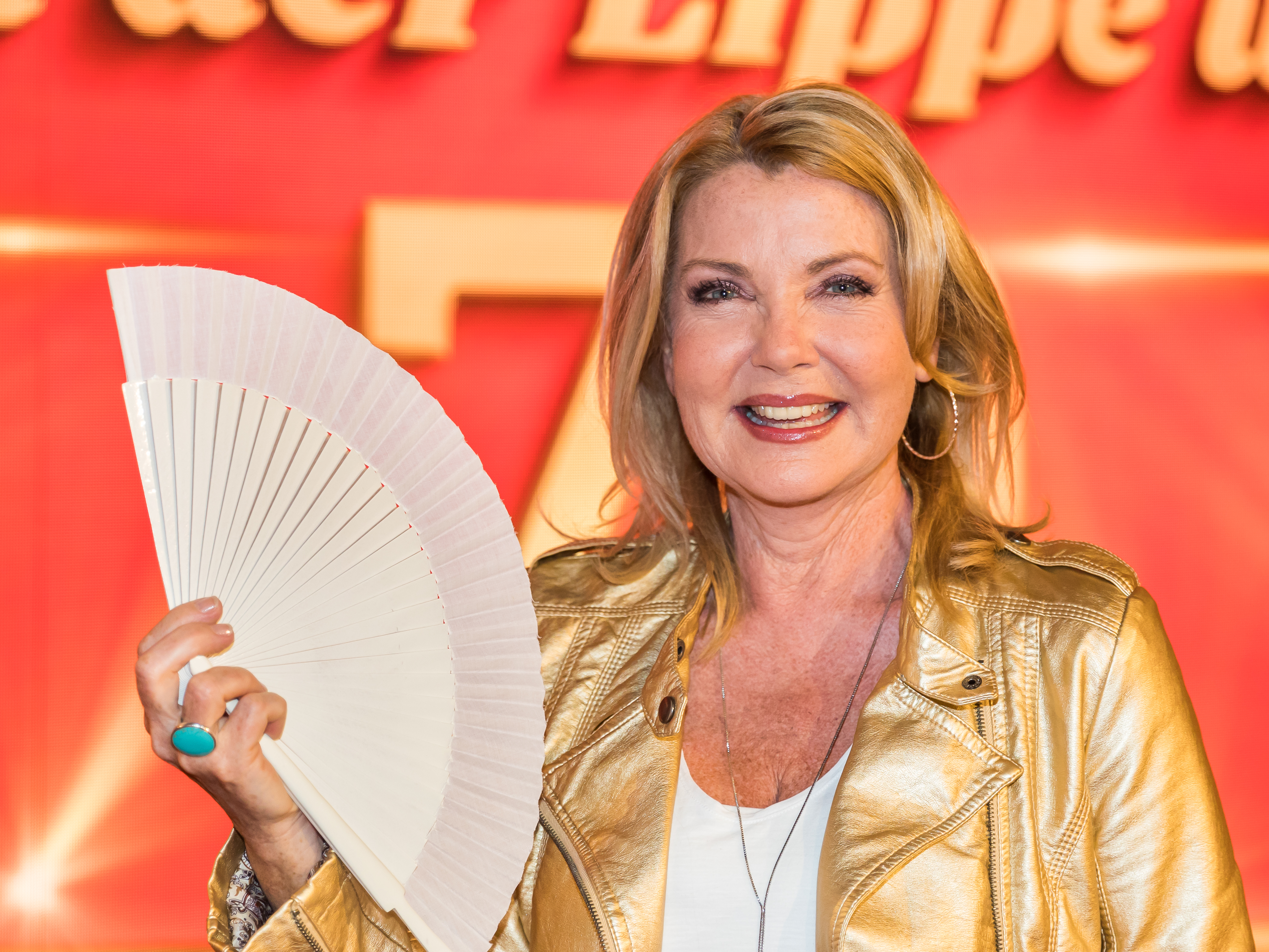 „Mensch Jürgen - von der Lippe wird 70“. Die Geburtstagsshow wird präsentiert von Jörg Pilawa. Fototermin nach Ende der Aufzeichnung. Sendetermin: 9. Juni 2018 um 20.15 Uhr im Ersten Foto: Jane Comerford